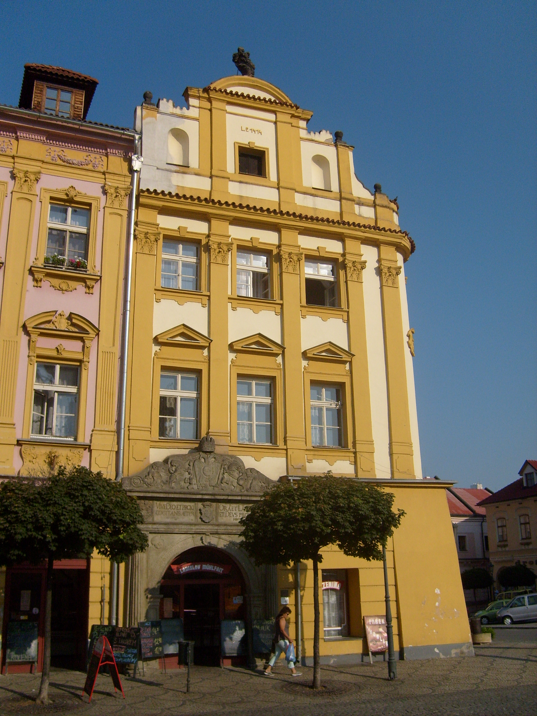 Khomovský dům na náměstí, Chrudim, Pardubice Region, Czech Republic